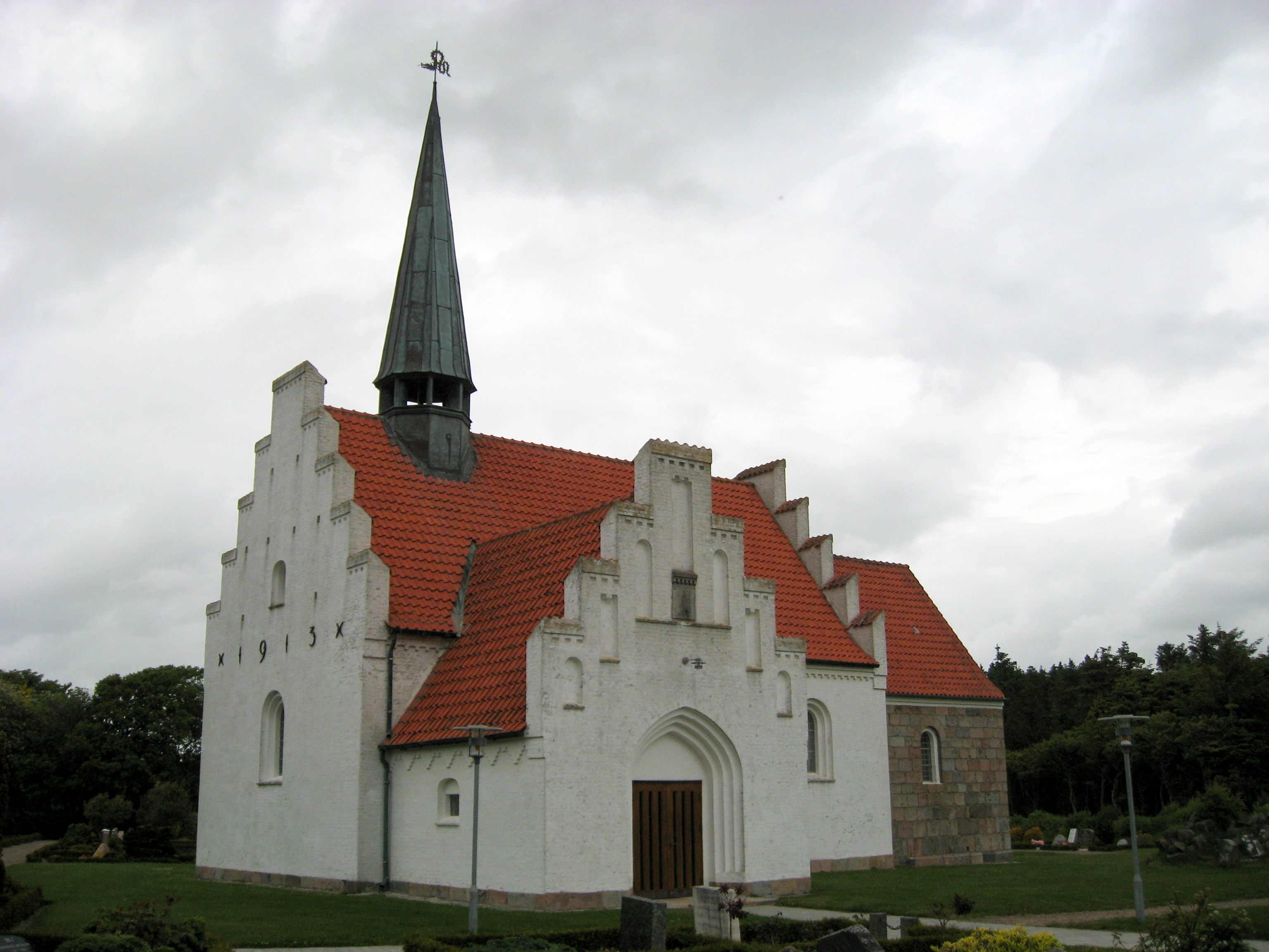 Lyngby Kirke, Hjørring Kommune